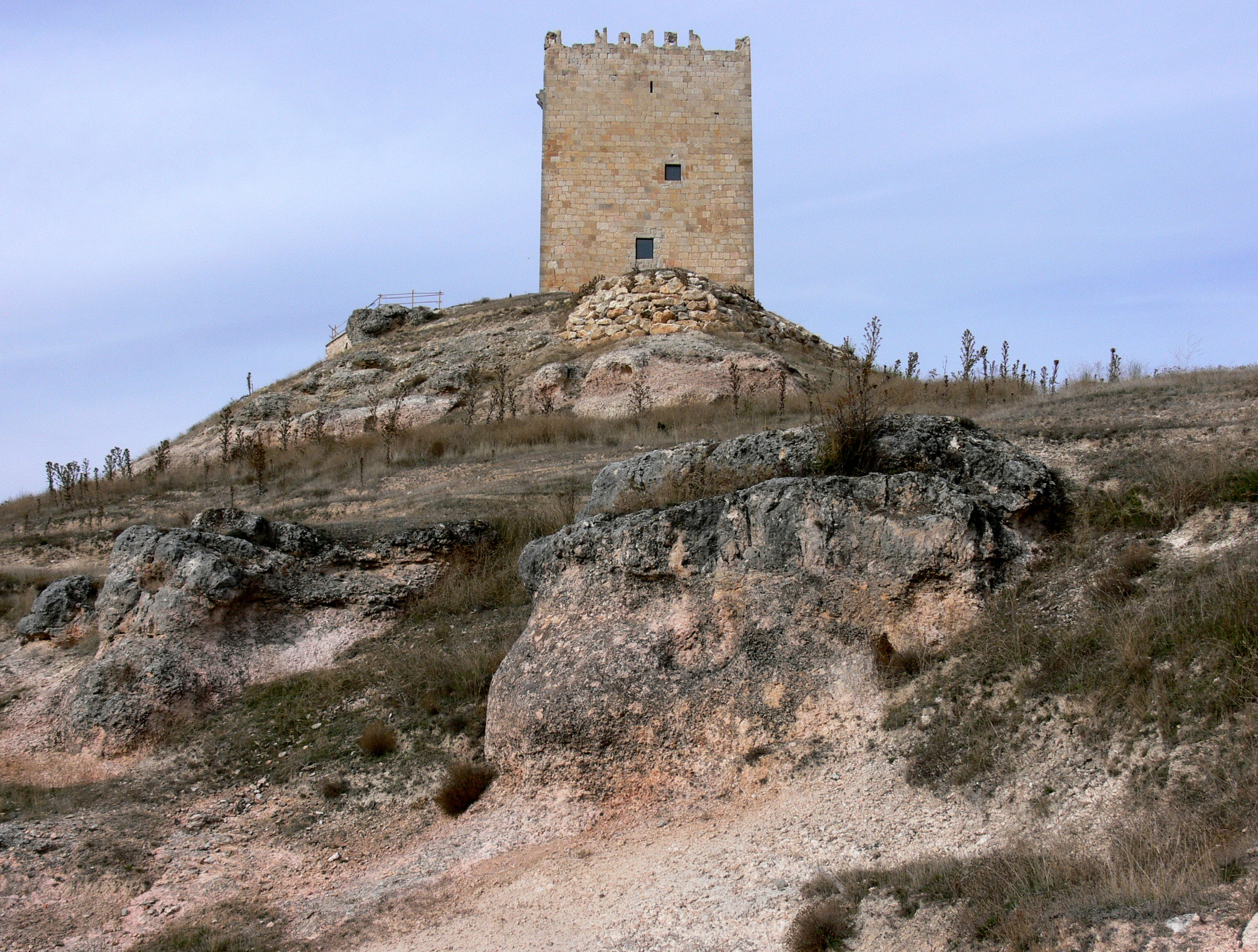 Torre del castillo de Langa de Duero, Soria - España.